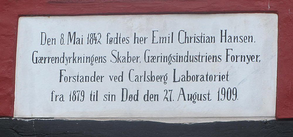 Mindeplade på Nederdammen 35 i Ribe